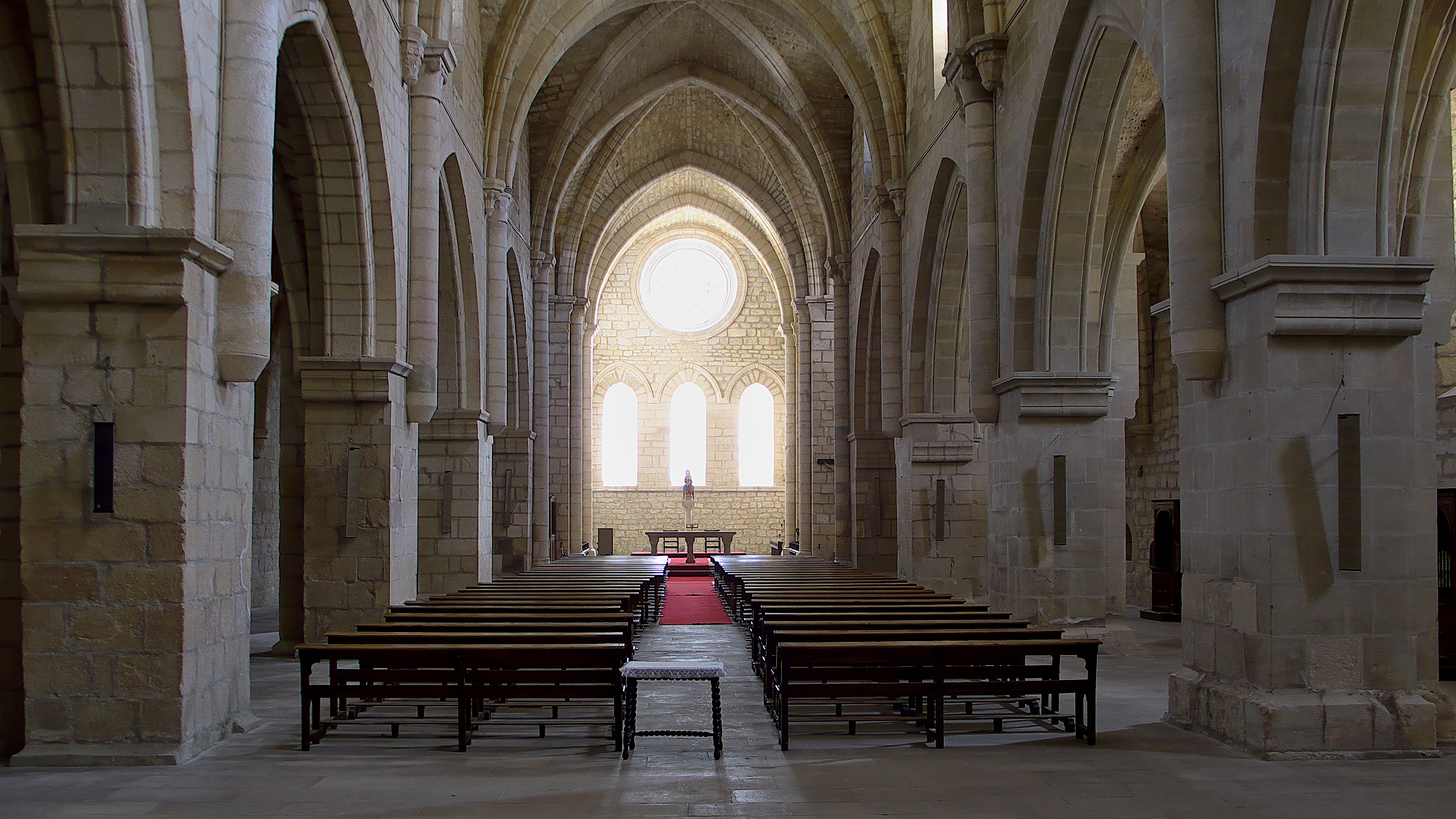 Nave central de la iglesia gótica-cisterciense, con planta de tres naves y cabecera plana (s. XIII)